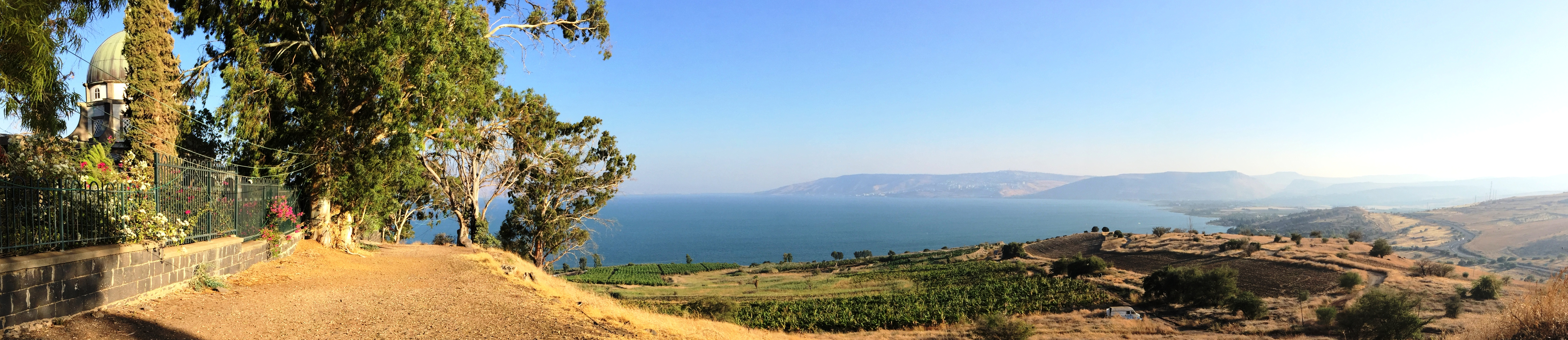 Lac de Tibériade vu du mont des Béatitudes ; Tibériade est visible dans le fond de la photographie